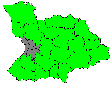 Comunidad Cuesta Las Piedras, ubicada en el Barrio Sábalos, lindando con el Barrio Cárcel (Mayagüez Urbano) de Mayagüez, Puerto Rico.